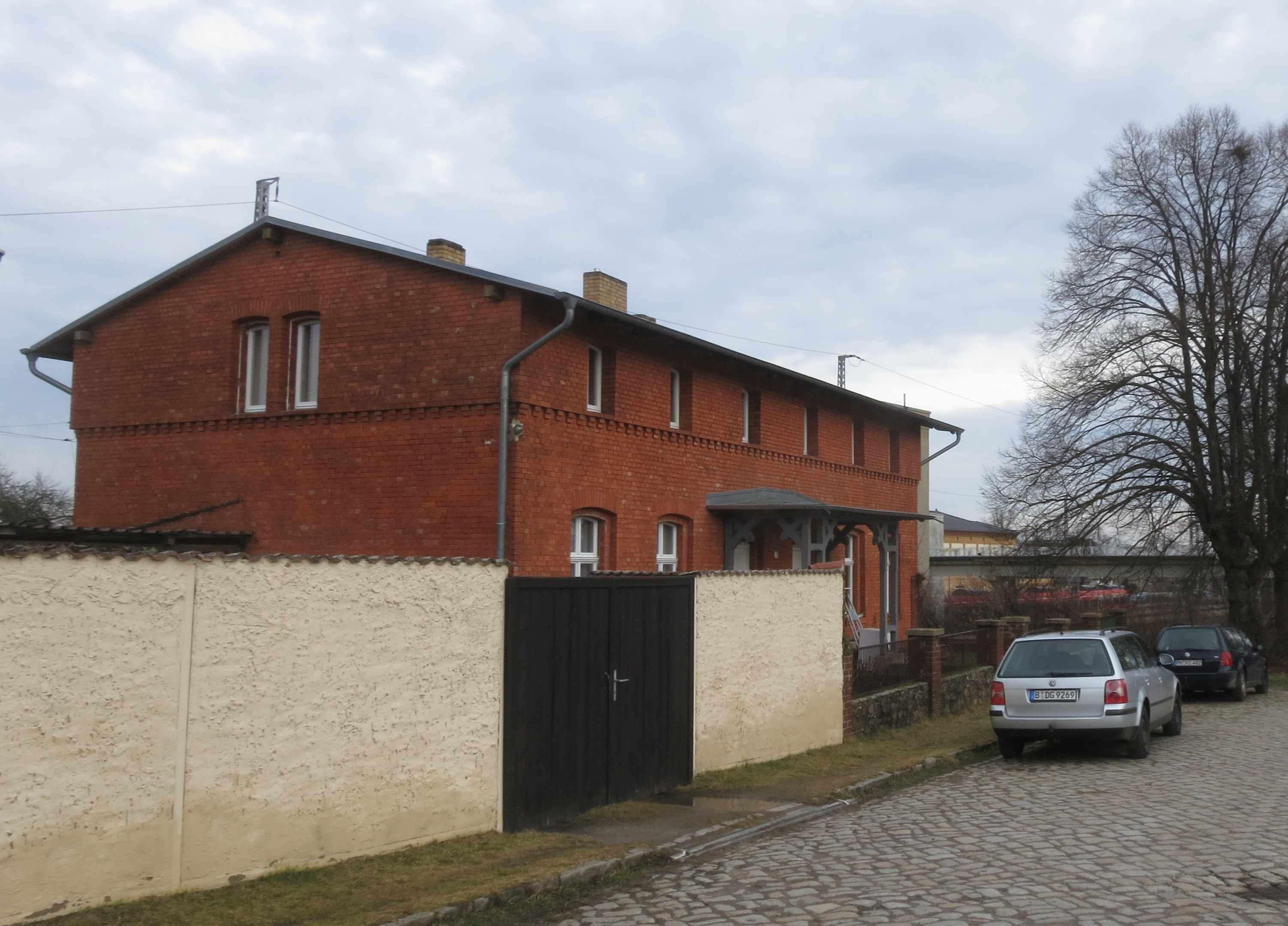 Bahnhof Bad Belzig, denkmalgeschütztes Wohnhaus Am Bahnhof 2